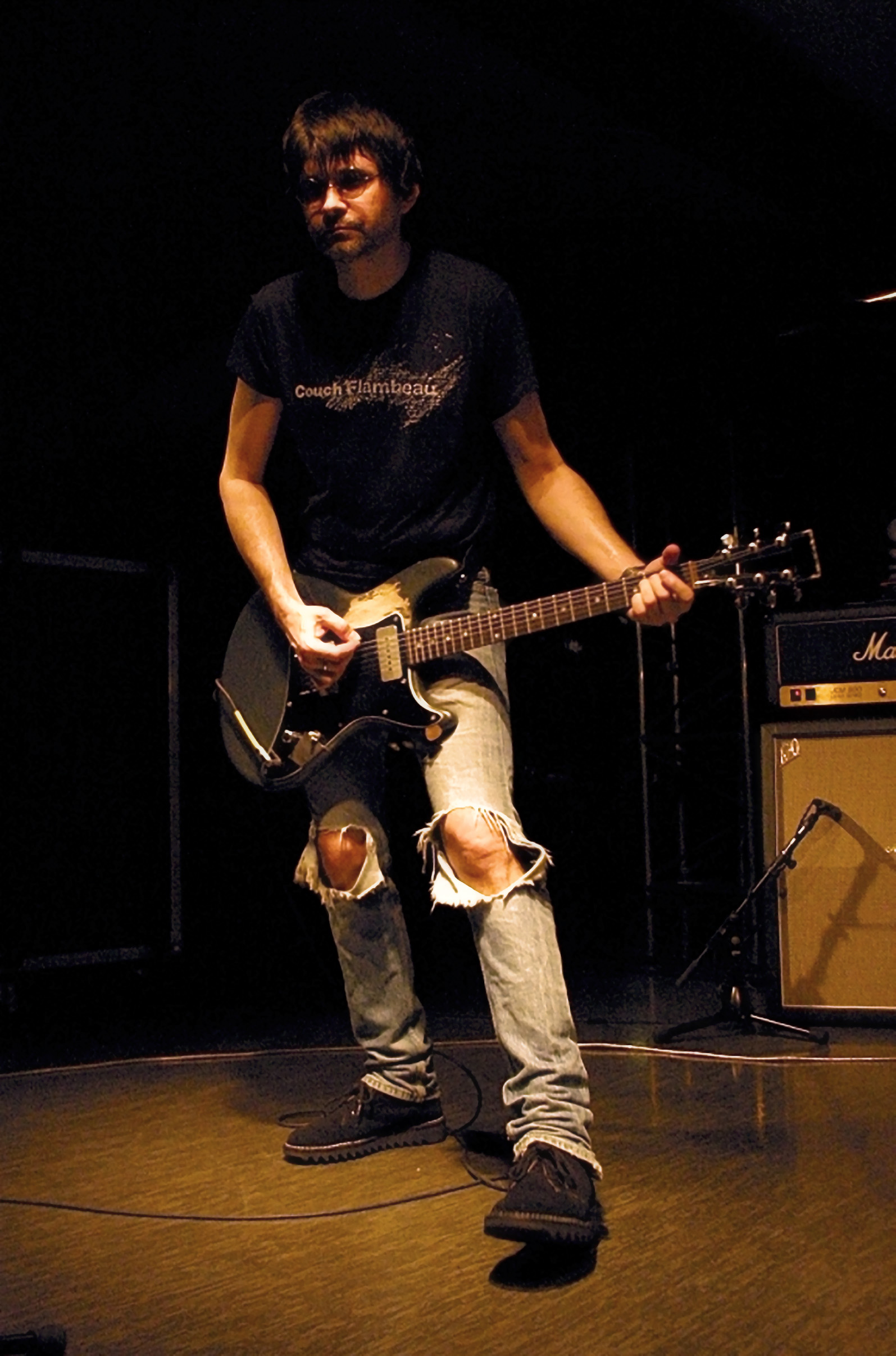 Steve Albini en concert avec Shellac à Sao Paulo en avril 2008